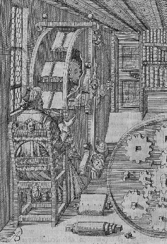 Agostino Ramellis Bücherrad aus dem 16. Jahrhundert